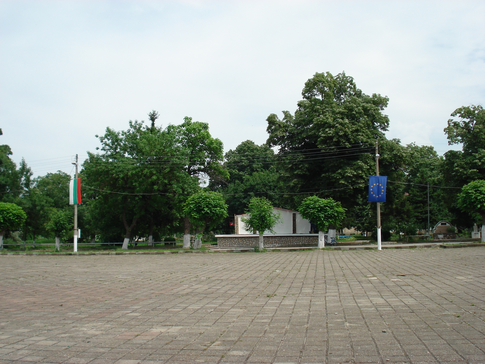 The square of Kapitanovtsi village, Vidin province, Bulgaria.